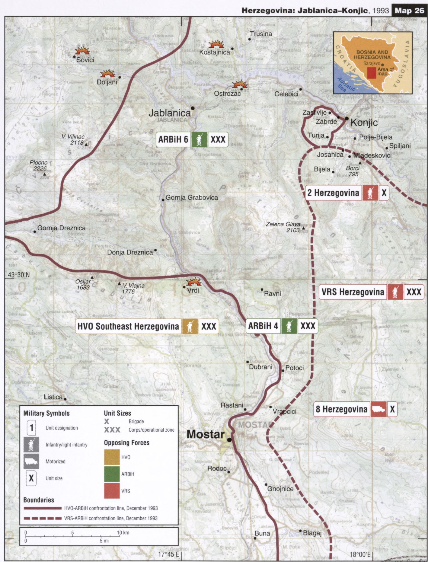 Crte bojišnice između HVO-a i ARBiH te VRS-a, prosinac 1993.